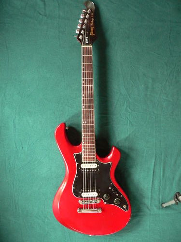 Gibson Victory MV-II